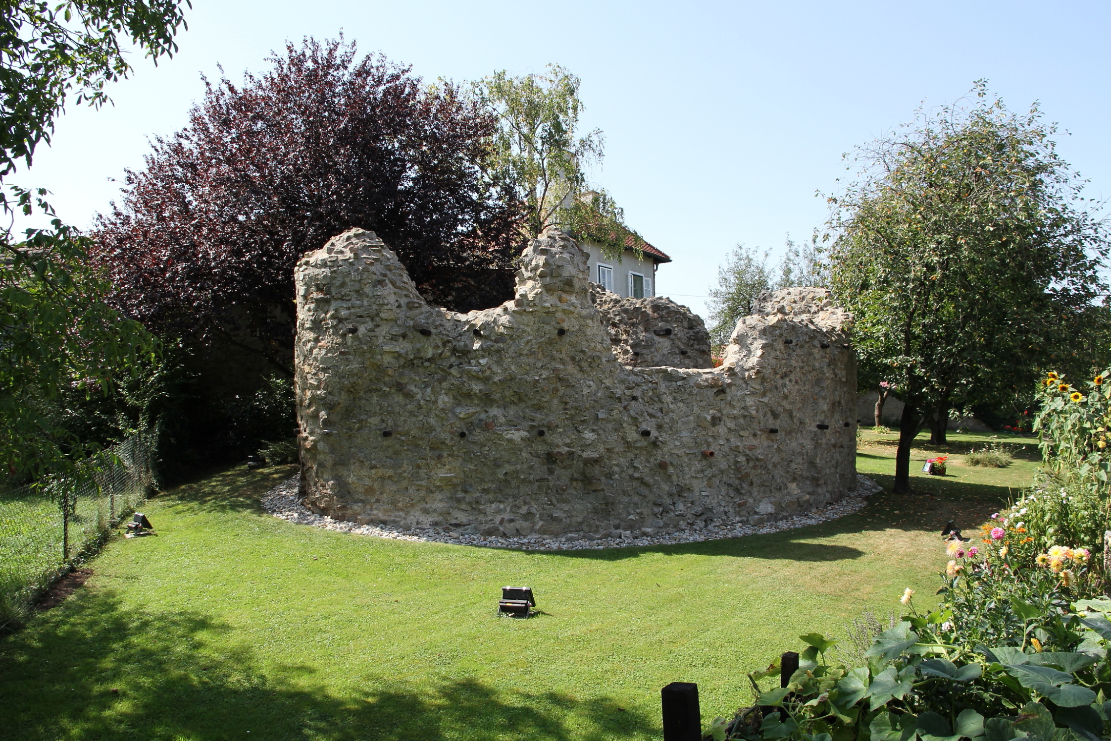 Der Fächerturm in Zeiselmauer, eine Ortschaft in der niederösterreichischen Gemeinde Zeiselmauer-Wolfpassing. Er wurde als nordöstlicher Eckturm in der ersten Hälfte des 4. Jahrhunderts an die bestehende Lagermauer angebaut und ist das älteste der sichtbaren römischen Bauwerke von Zeiselmauer.